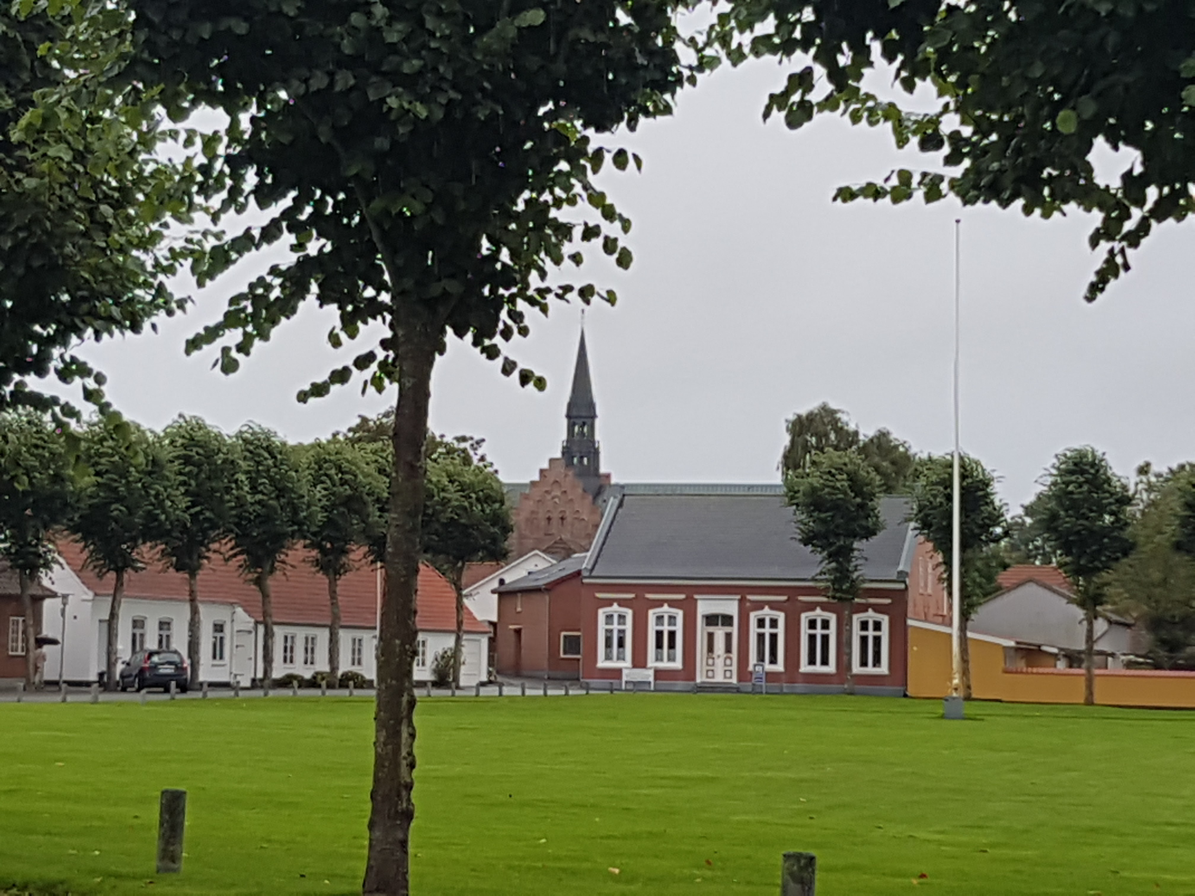 Klokkenistavdelingen ved den danske kirkemusikkskolen i Løgumkloster